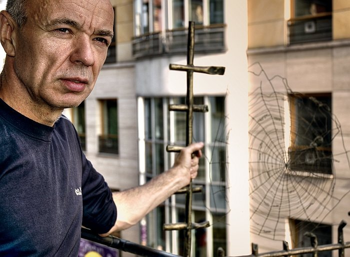 Mieczysław Gryza, polski metaloplastyk